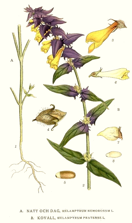 Melampyrum nemorosum L., Melampyrum pratense L. Original Description A. Natt och dag, Melampyrum nemorosum L. B. Kovall, Melampyrum pratense L.